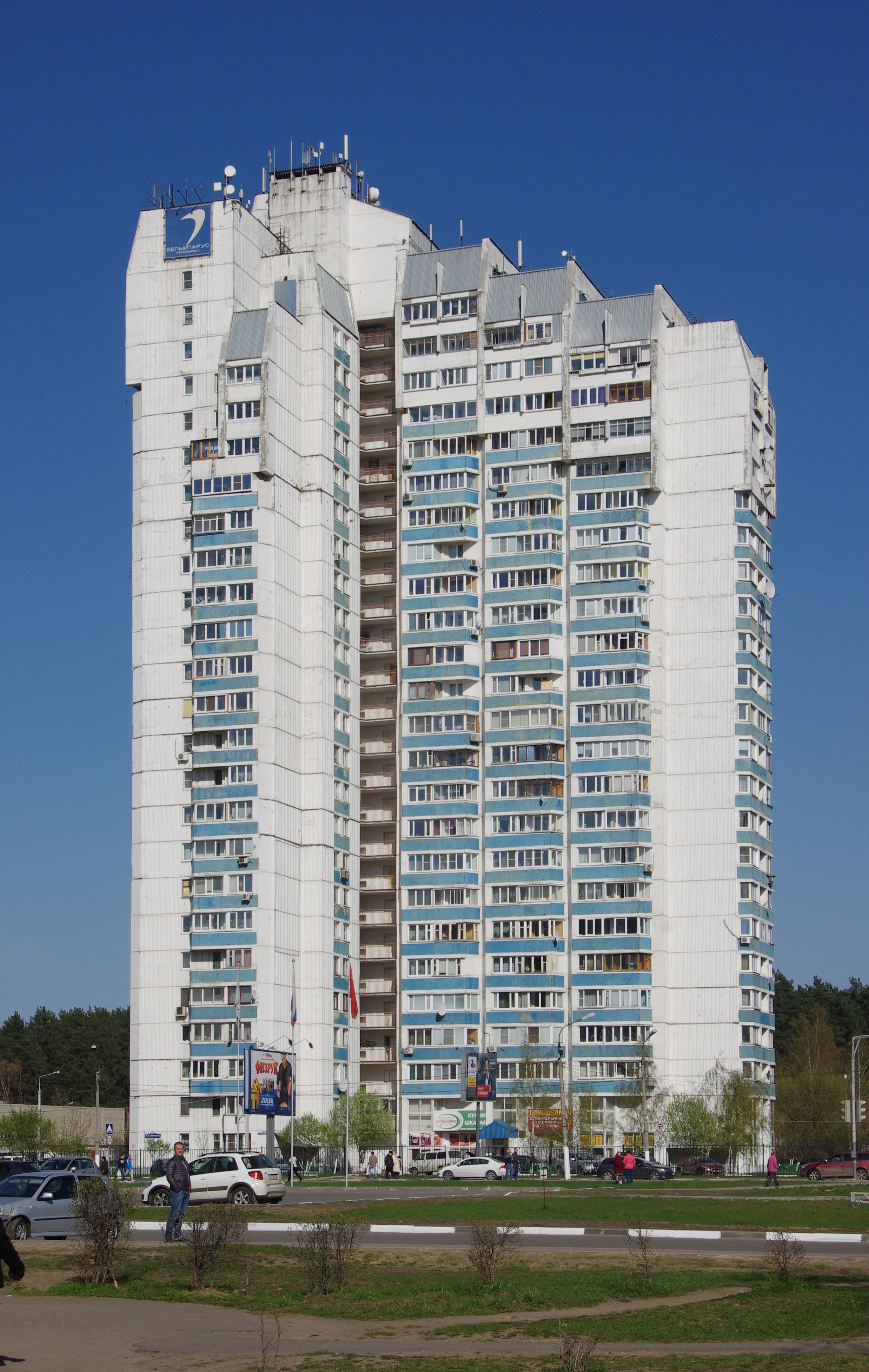 Жилой дом ул. Объединения улица, д. 9/28 в Балашихе